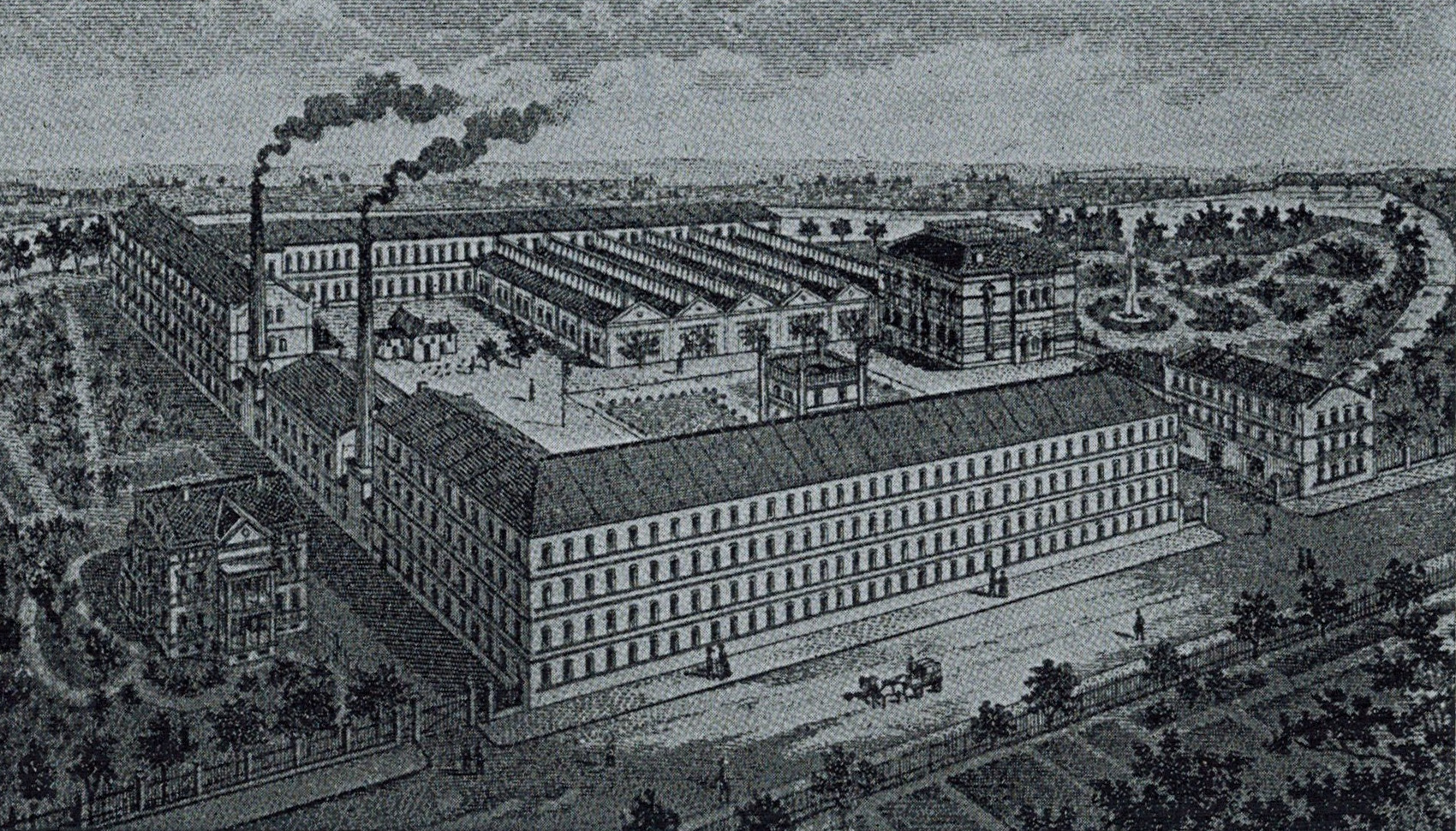 Fabrik Elias, früher